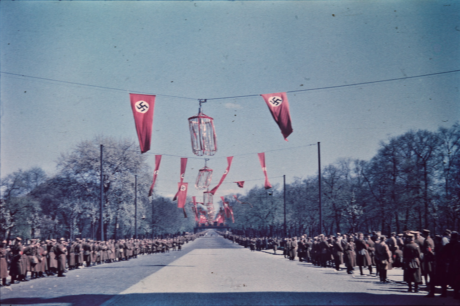 Bildet er hentet fra Arkivverket. Pyntede gater i Berlin, Arbeidets dag (1. mai). Store folkemengder, flagg med hakekors. Fotograf: Thomas Neumann År: 1937 Kamera: Leica Film: Agfa color neu Arkivreferanse: PA1456Ub1_1_1_29 Arkivinstitusjon : Riksarkivet Arkivnavn : Neumann, Thomas Sted : Tyskland, Berlin, Berlin, Emneord: Bymiljø Avbildet